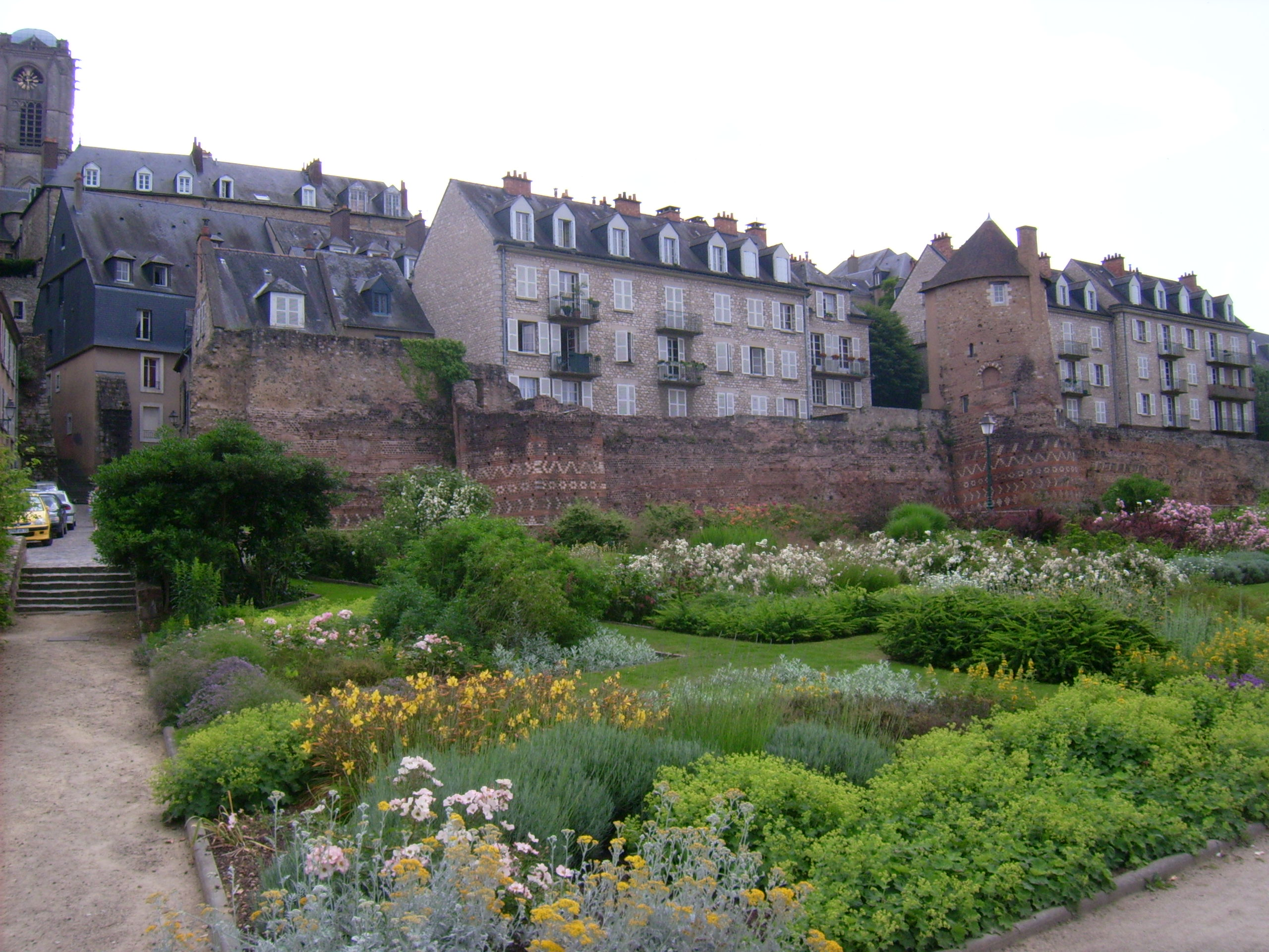 Face nord de l'enceinte Gallo-Romaine du Mans et jardins de Gourdaine